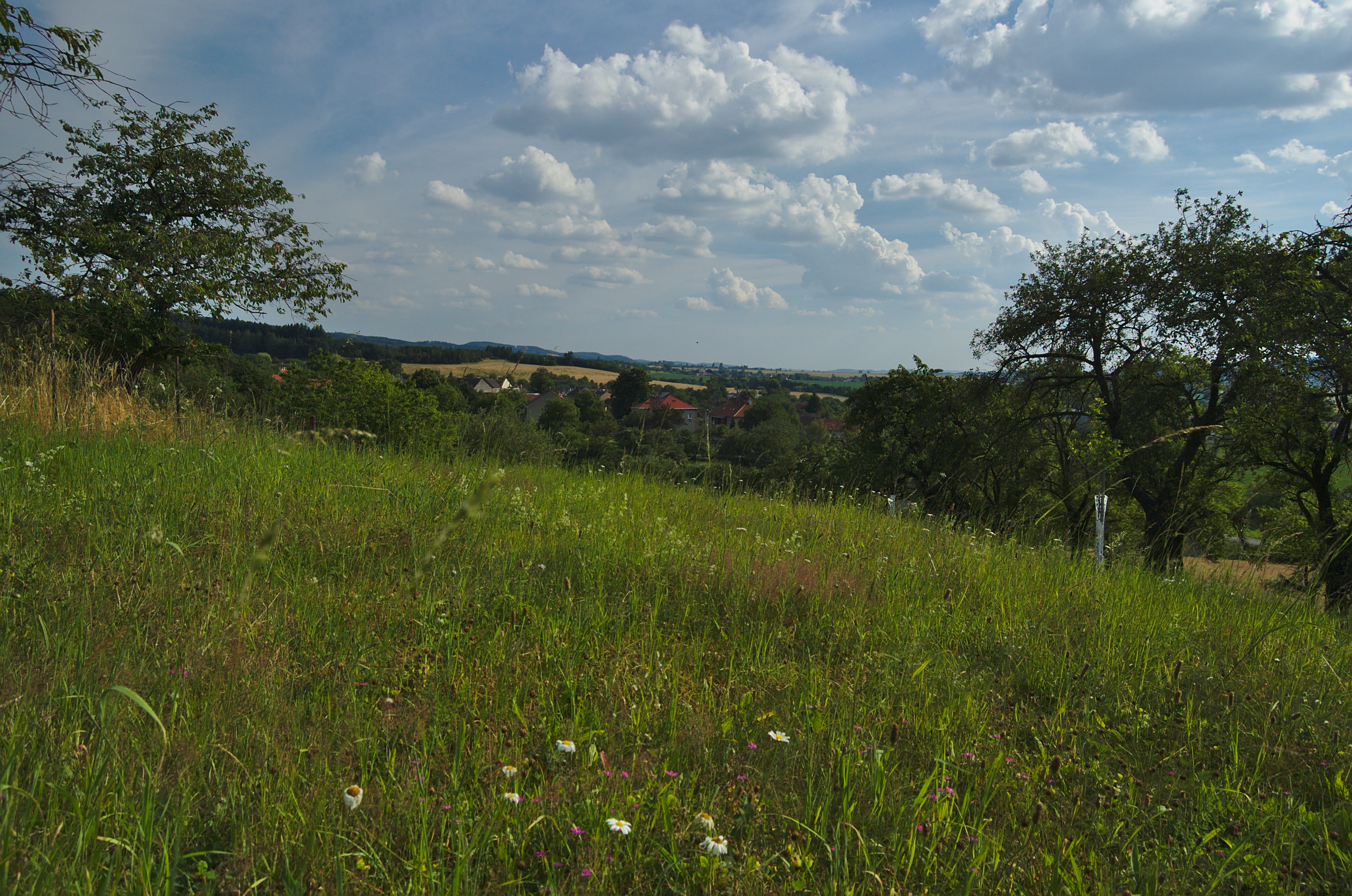 Uhřice - pohled na vesnici, okres Blansko